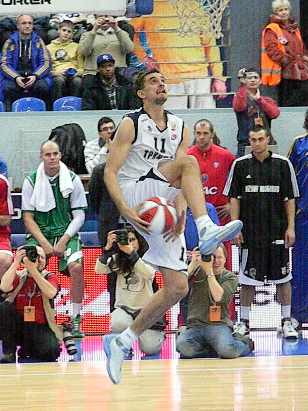 Slam-dunk by Valeri Likhodei at all-star PBL game 2011